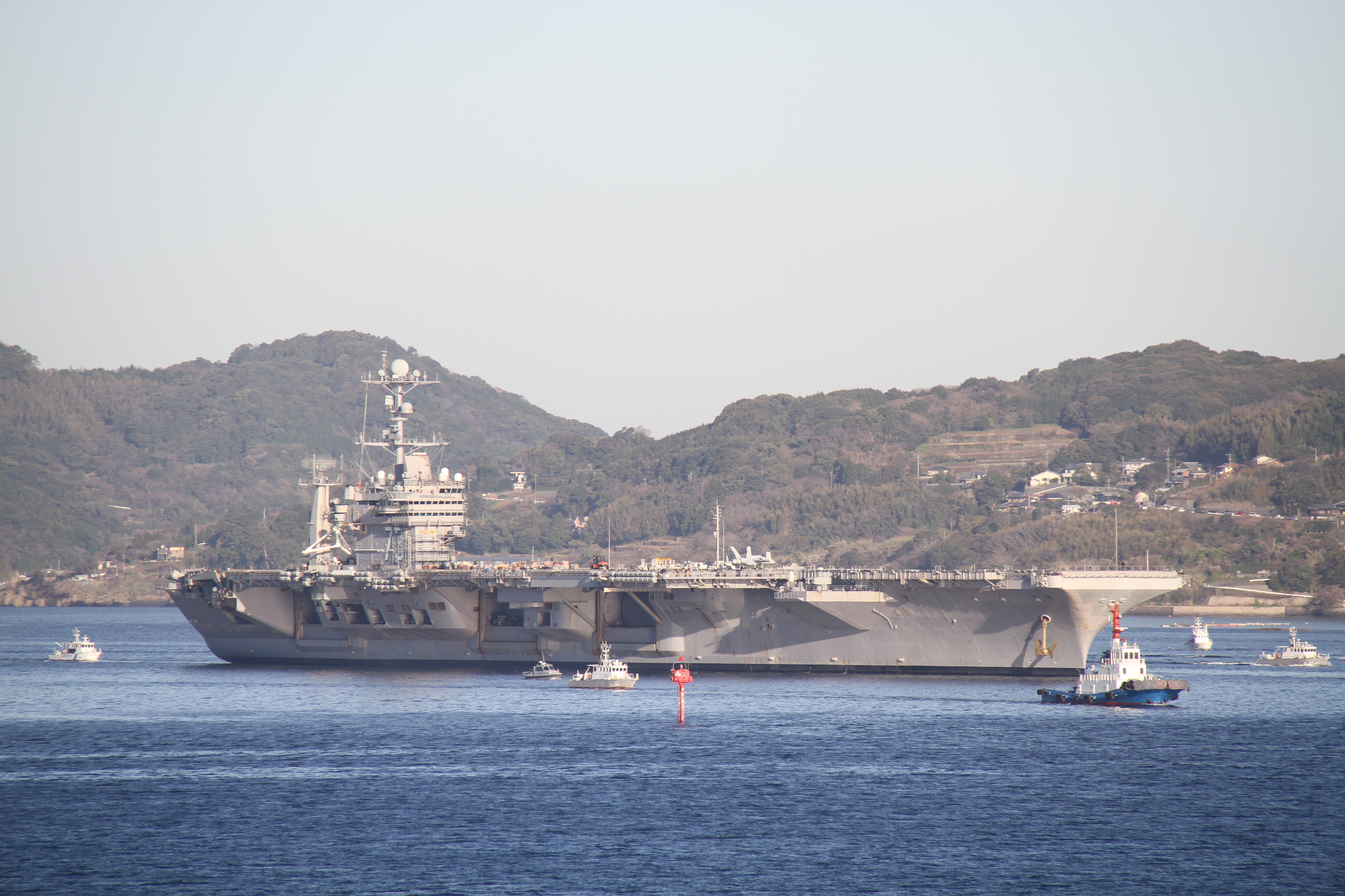 First visit to Sasebo, Nagasaki. Welcome.